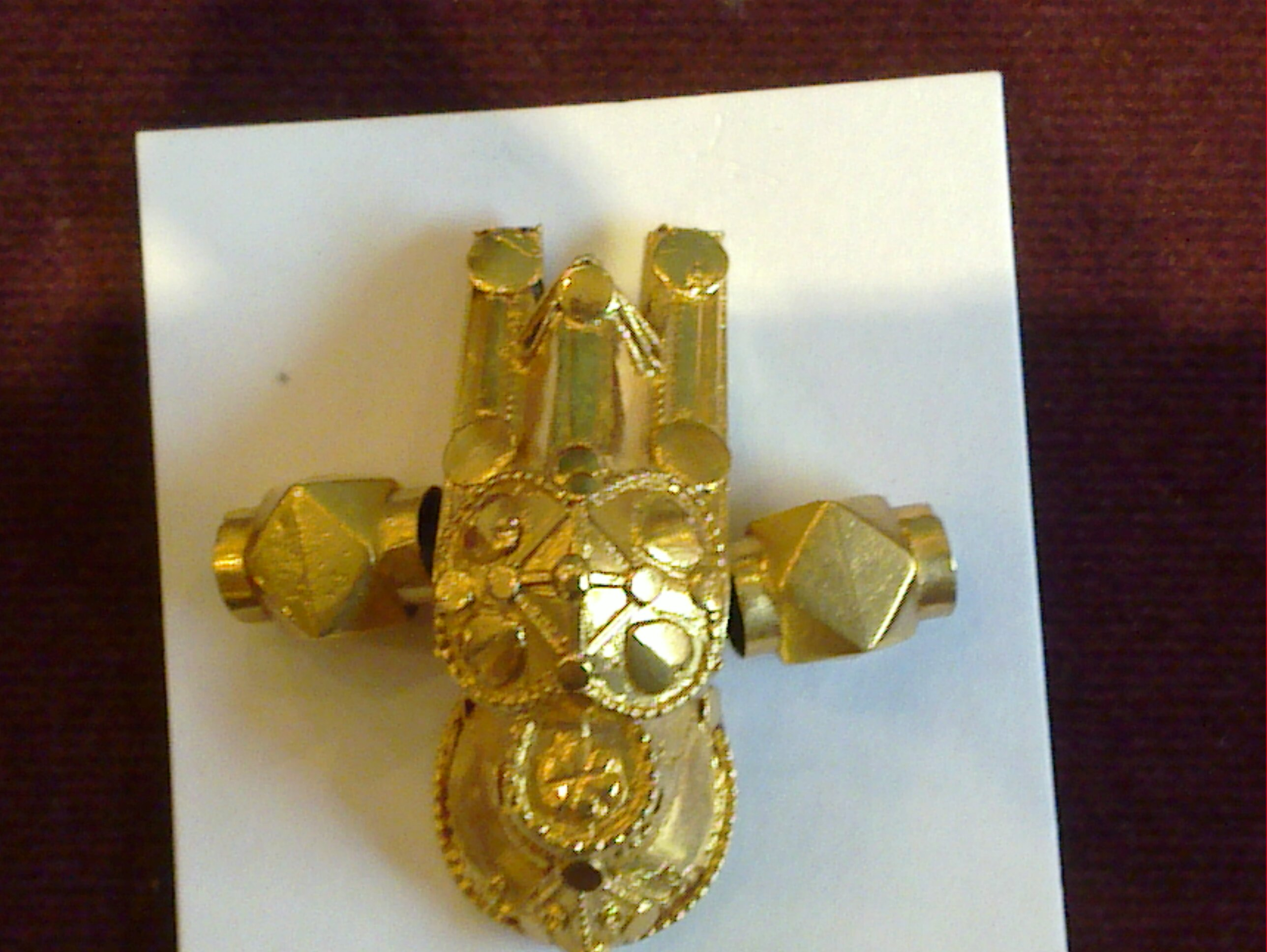 a-koundas tradition